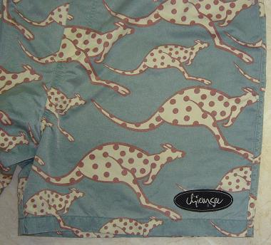 Windsurfing Chiemsee sporstwear men's shorts